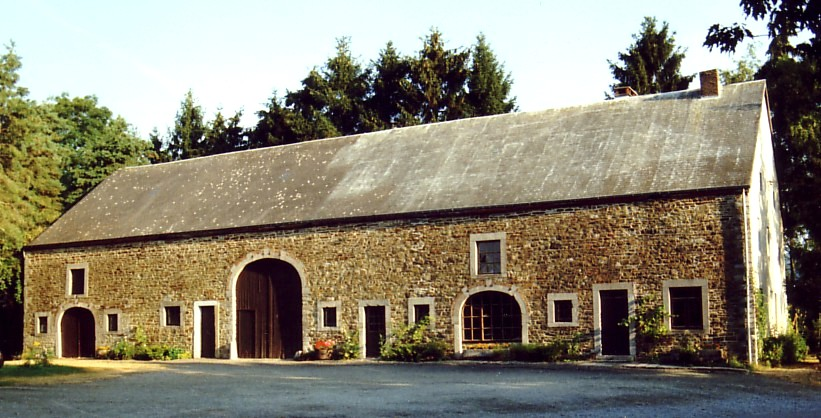 Ancienne ferme du bas du village de Lesterny photographiée par moi (Alain Canneel) en 1995. Pour plus de détails, voir la légende ou la revue Terres entre Wamme et Lhomme du cercle historique de l'entité de Nassogne.